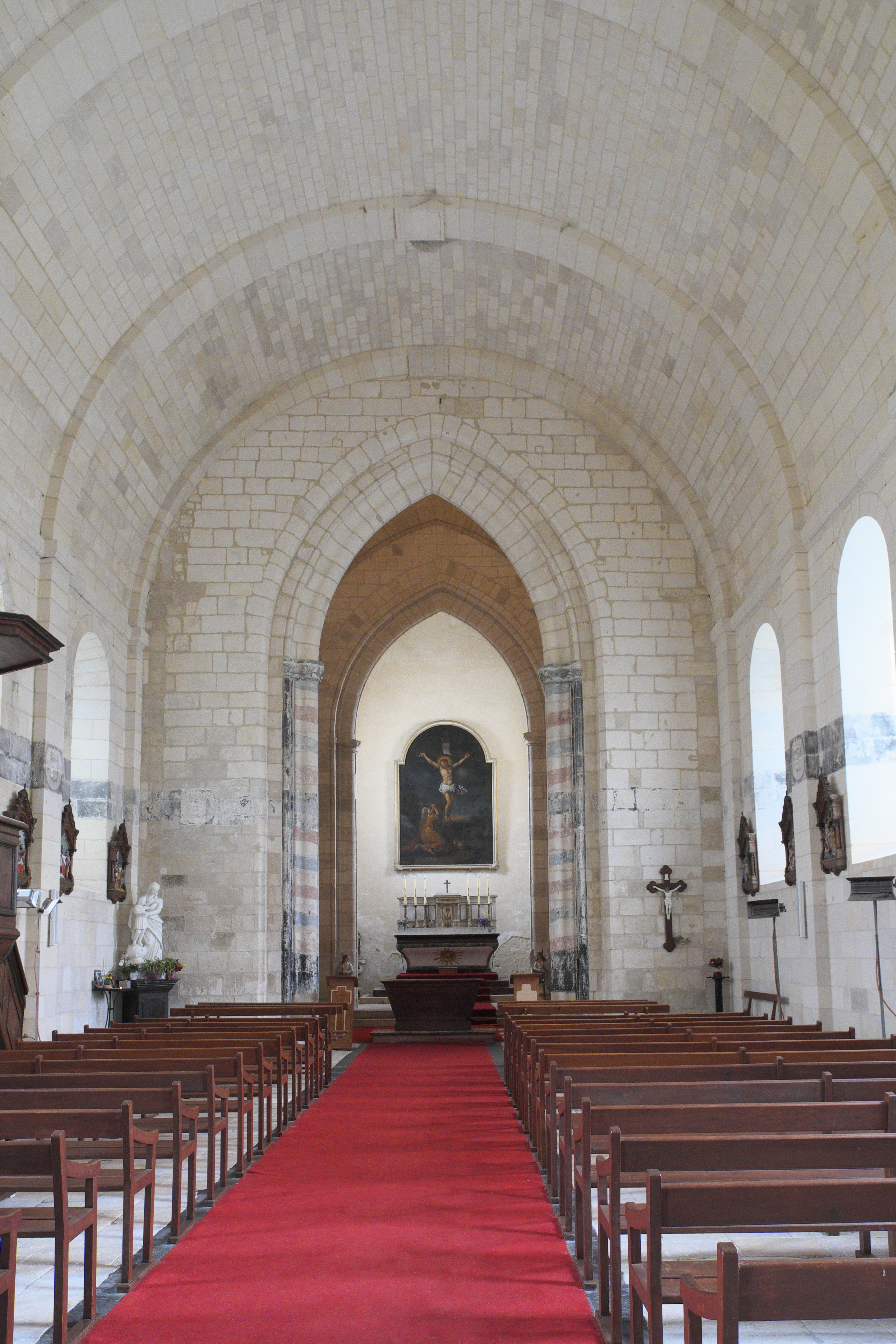 Katholische Kirche Saint-Pierre in Soubise im Département Charente-Maritime (Nouvelle-Aquitaine/Frankreich), Innenraum